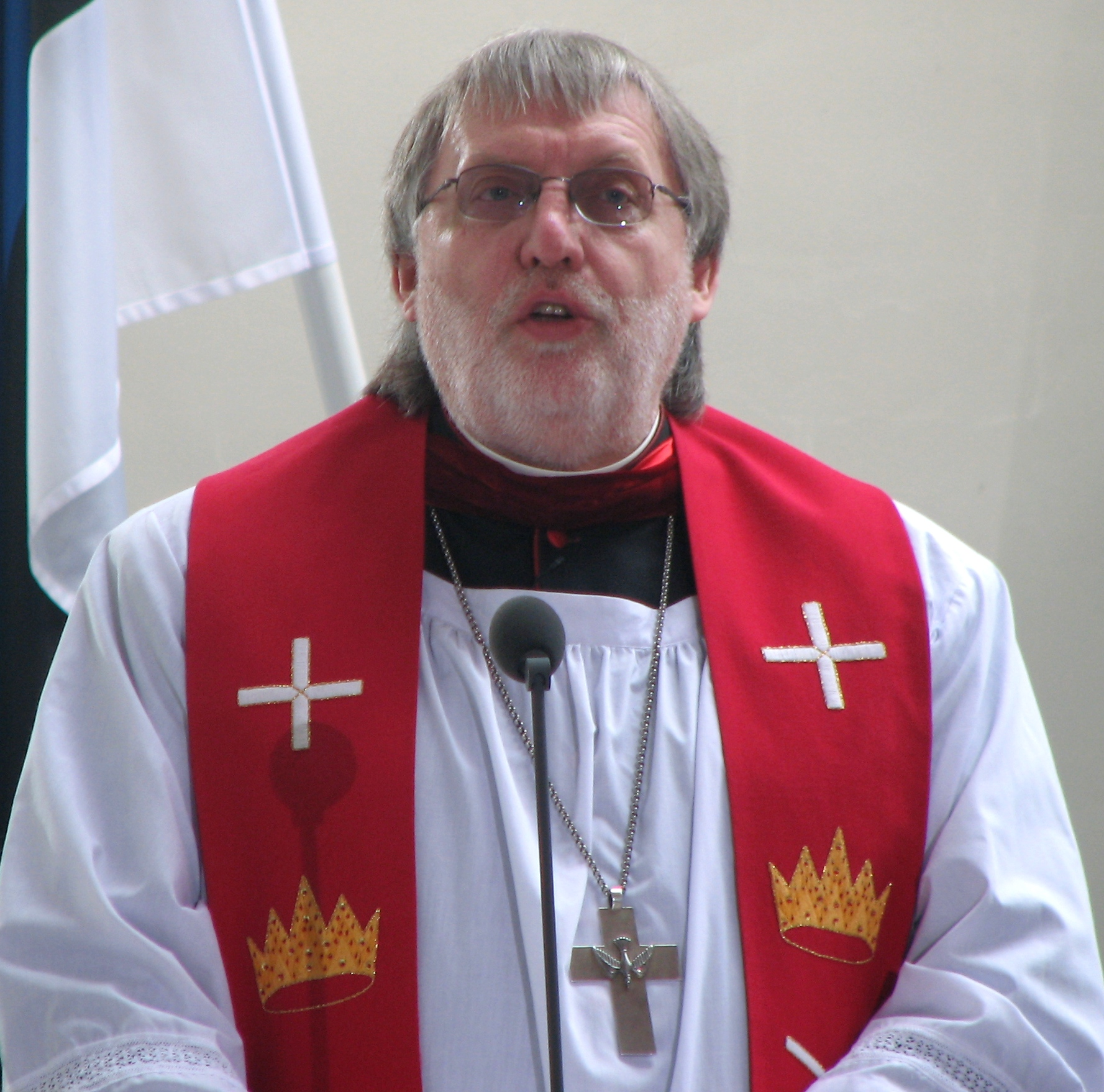 Heigo Ritsbek teenimas nelipüha oikumeenilisel jumalateenistusel Harkujärve Stefanose kirikus